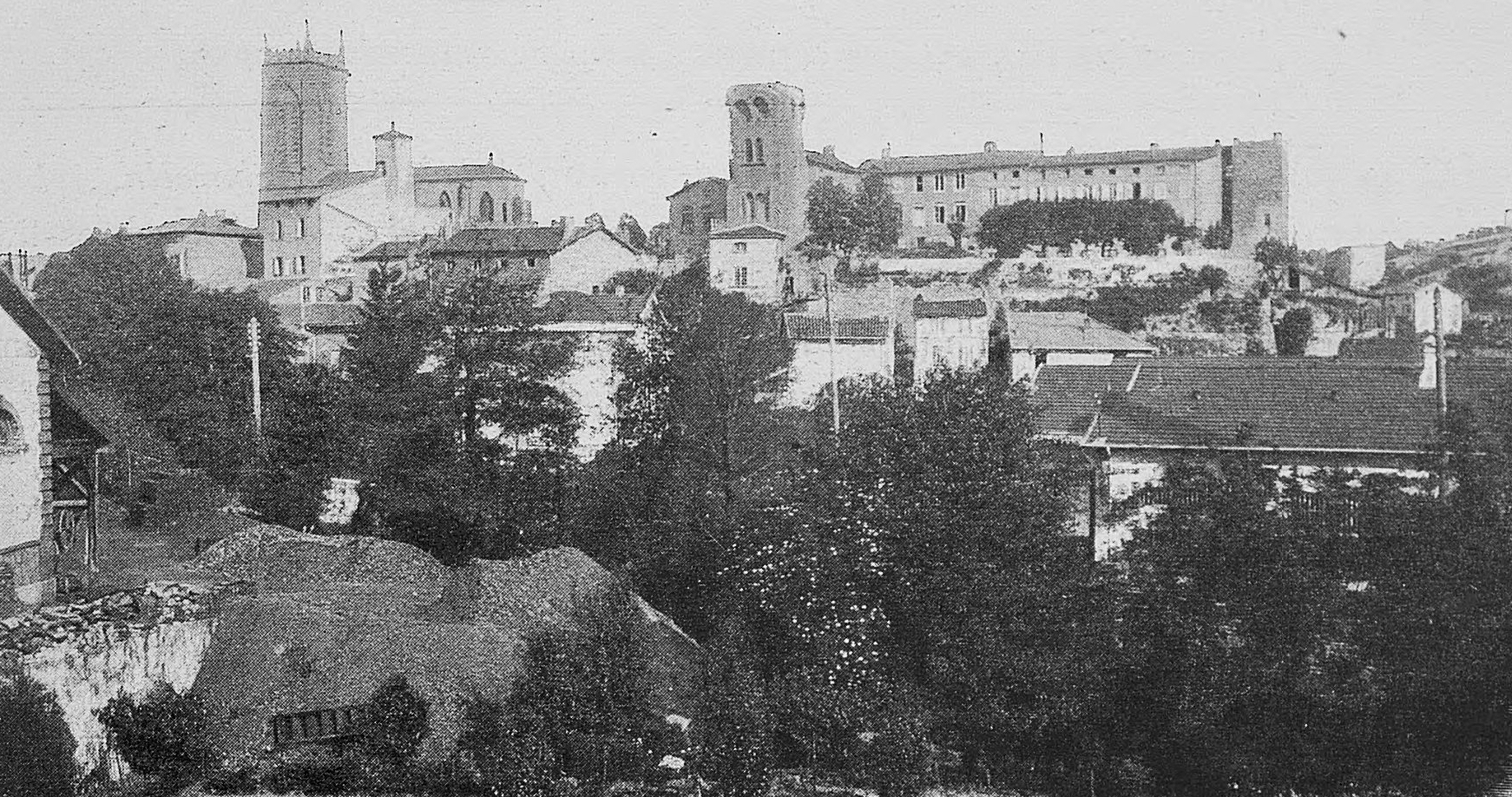 Dictionnaire illustré des communes du département du Rhône. Tome 1 / par MM. E. de Rolland et D. Clouzet.